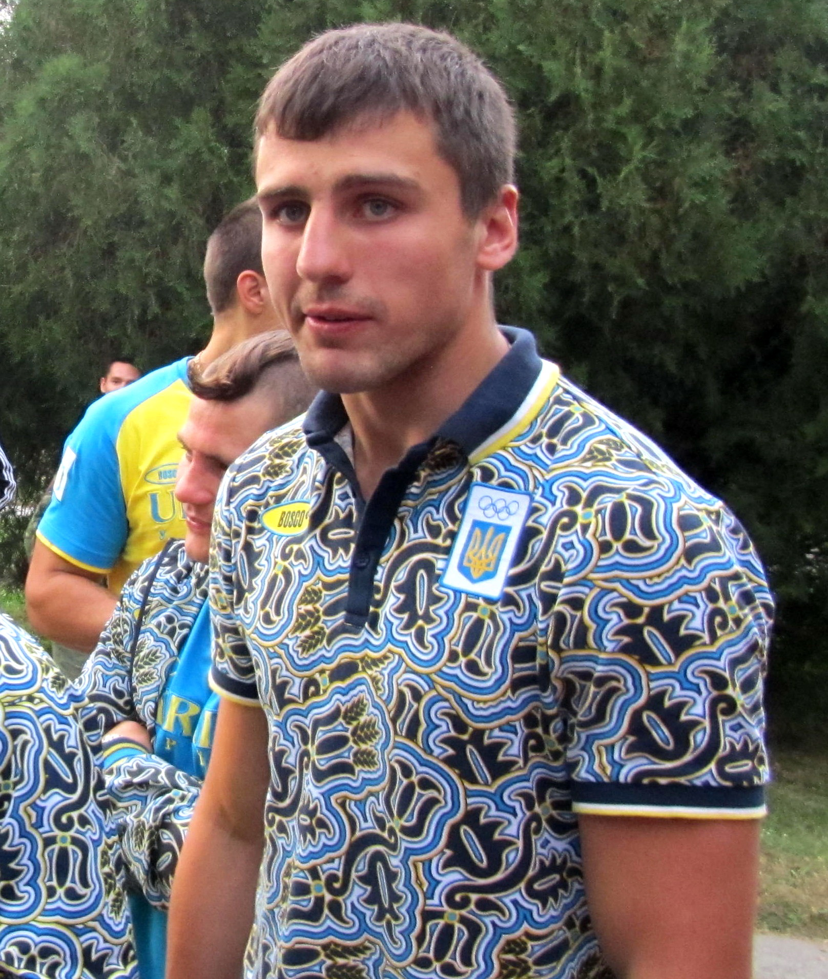 Гвоздик Олександр Сергійович (Кременчук, 4.10.2012)